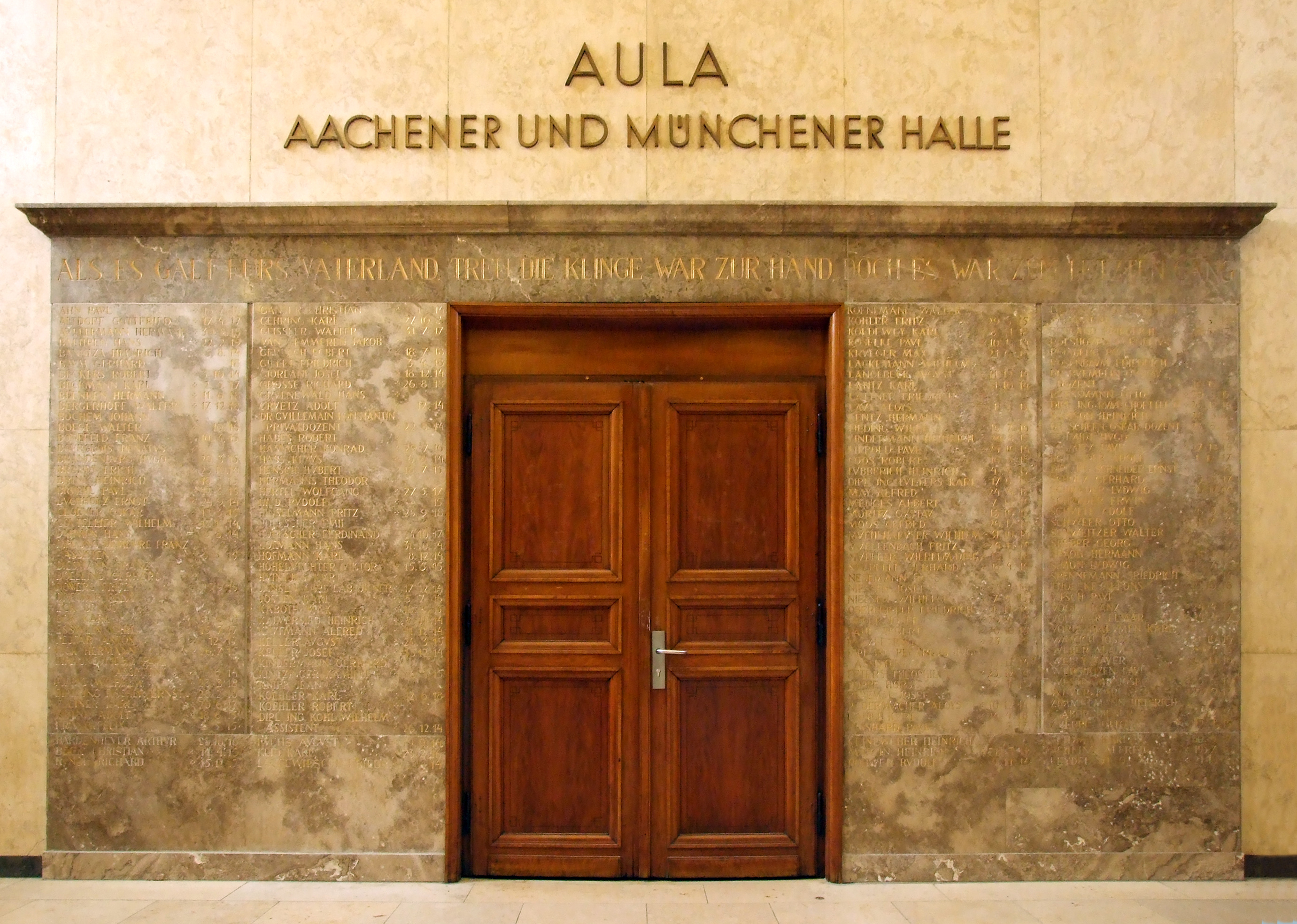 Gedenktafel im Hauptgebäude der RWTH Aachen Oben ist zu lesen: „Als es galt fürs Vaterland, treu die Klinge war zur Hand, doch es war zum letzten Gang“